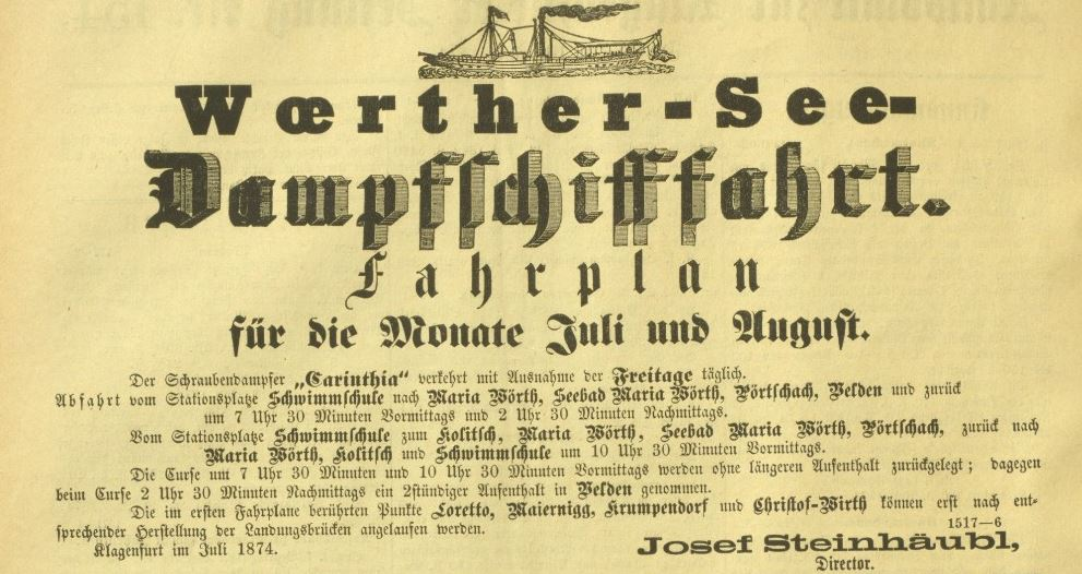 Fahrplan und Inserat der Wörthersee Schifffahrt aus 1874